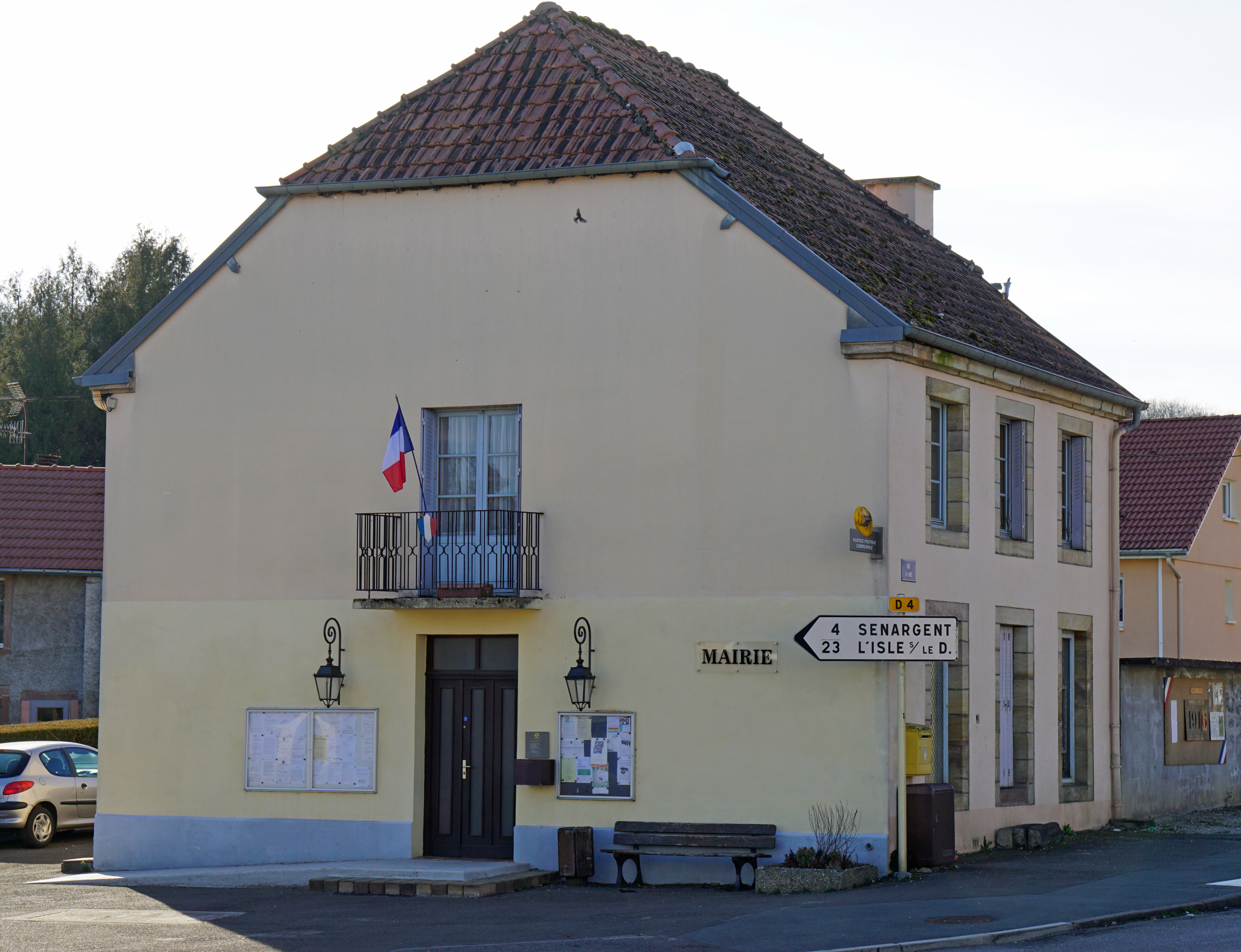 La mairie d'Athesans-Étroitefontaine.